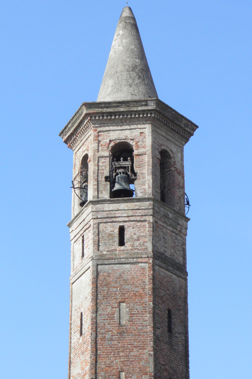 Il campanile della frazione di Mettone di Casirate Olona nel comune di Lacchiarella (MI)